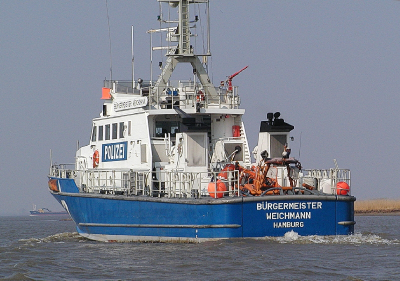 Die Bürgermeister Weichmann in der Elbe